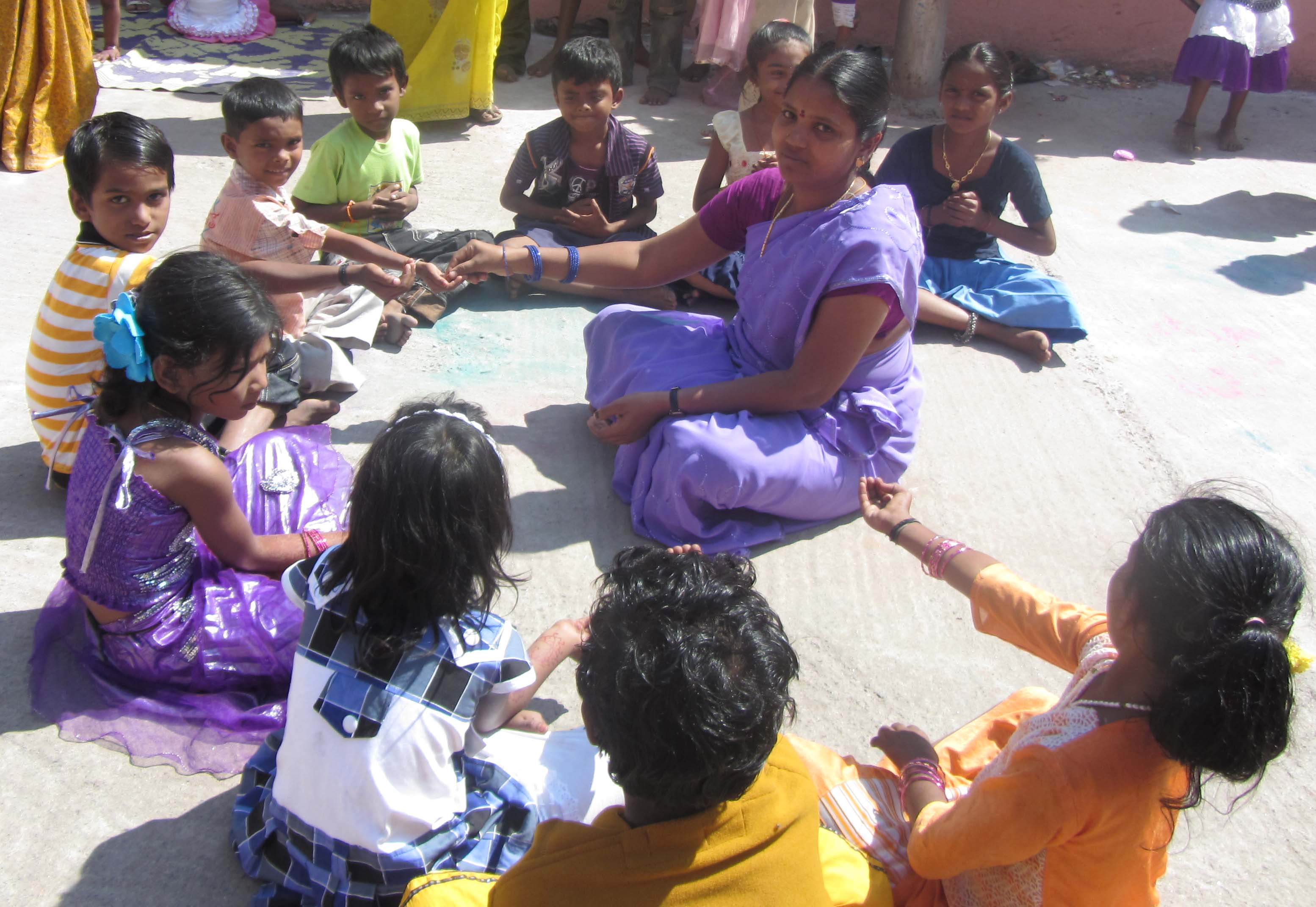 'கல்லுக் கொடுத்தான் கல்லே வா' - என்னும் விளையாட்டு